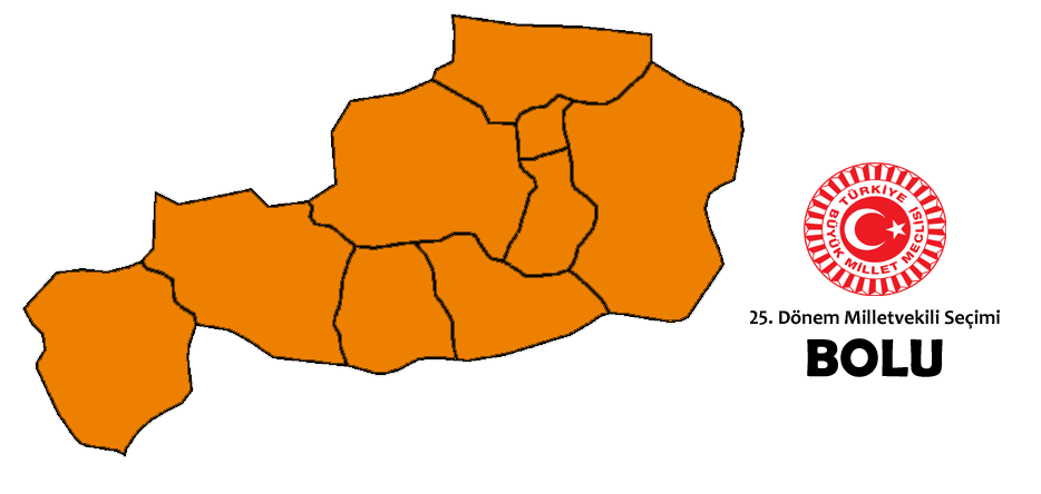 2015 genel seçim sonuçları